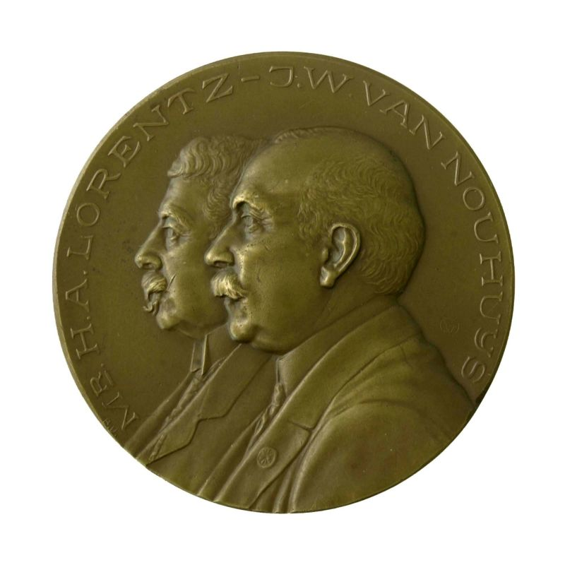 Penning. Legpenning geslagen ter ere van H.A. Lorentz en J.W. van Nouhuys